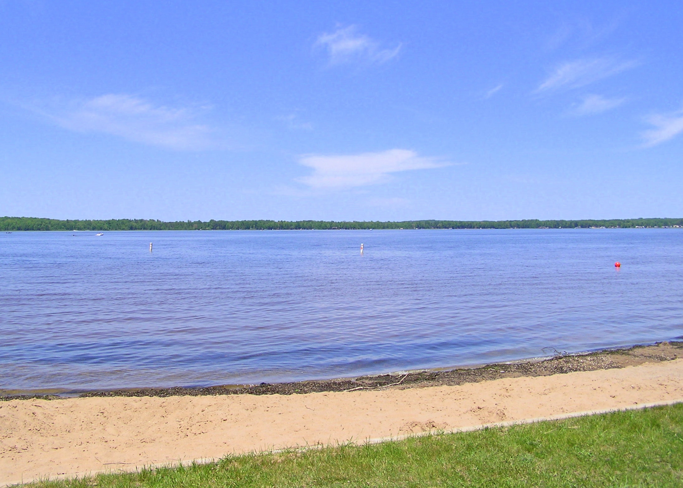 Lake Noquebay